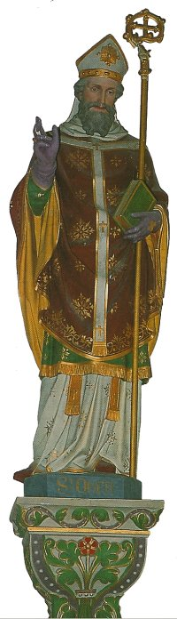 Statue de Saint Omer dans l'église d'Orval (Manche)